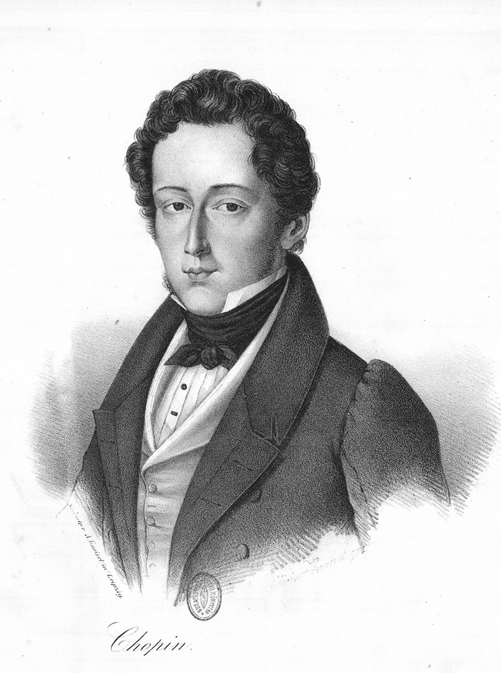 Felvett francia nevén Frédéric François Chopin, eredetileg Fryderyk Franciszek Chopin, (lengyel levelezésében olykor Szopen is) (Żelazowa Wola, 1810. március 1. – Paris, 1849. október 17.) lengyel zeneszerző és zongoravirtuóz.